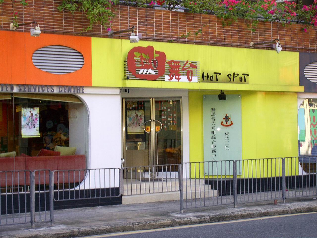 中文（香港）: 東華三院賽馬會大角咀綜合服務中心